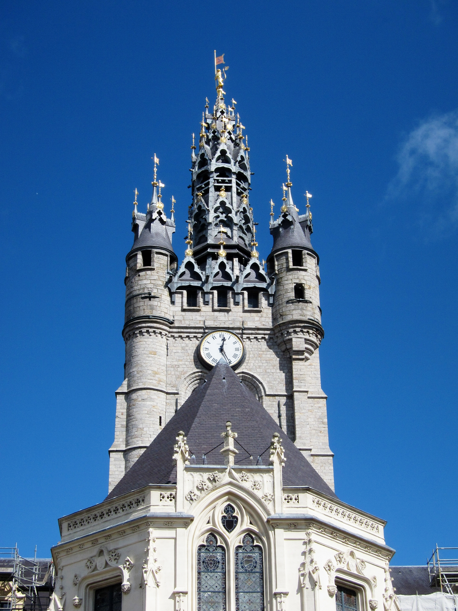 Le haut du beffroi de l'hôtel de ville de Douai vu de la cour de la mairie. .